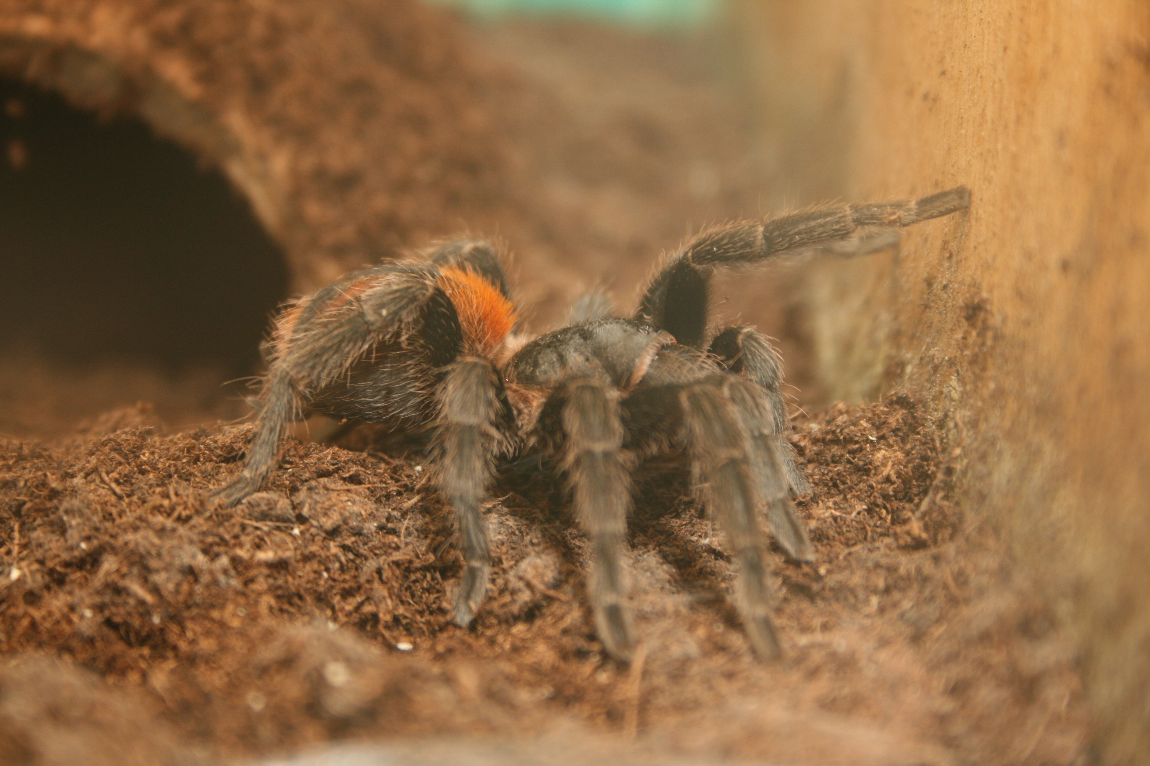 Euathlus SP Red